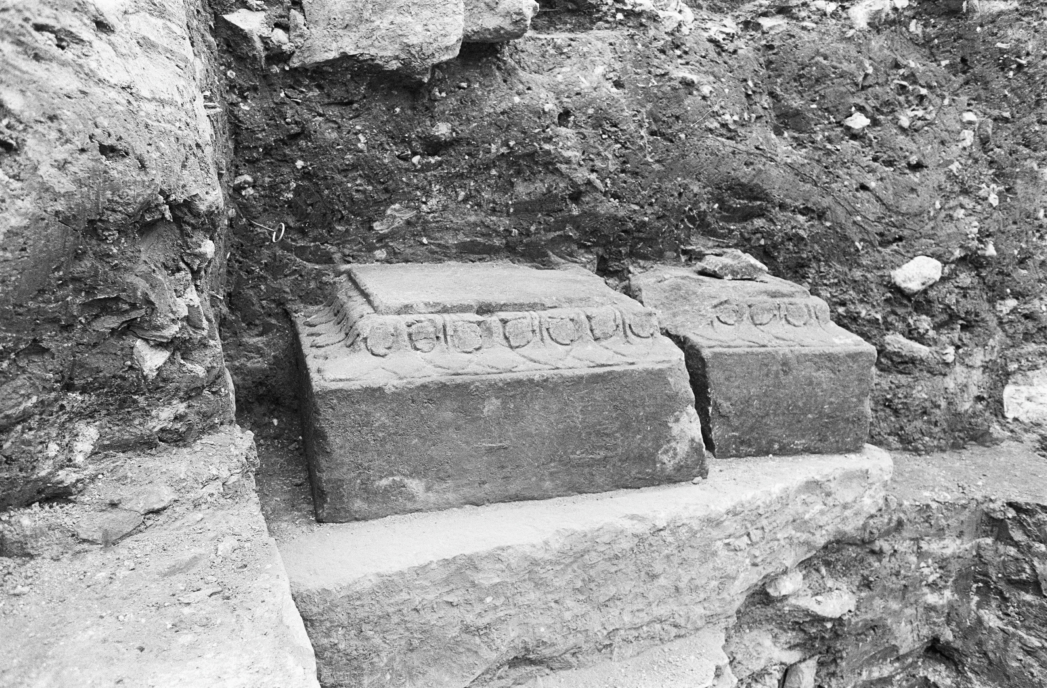 opgravingen